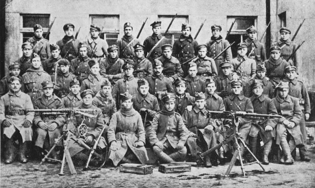 1 kompania km Wileńskiego Pułku Strzelców z por. Orzeszką, pchor. Aleksandrem Likszą i sierż. Bardzickim